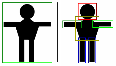 Einfache Darstellung der Funktionsweise und Anordnung von Hitboxen in 2D.